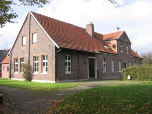 Das alte Pastorat und heutige Pfarrheim. Das älteste Gebäude in Erle (Raesfeld). Blick von der Femeiche auf die Frontseite.